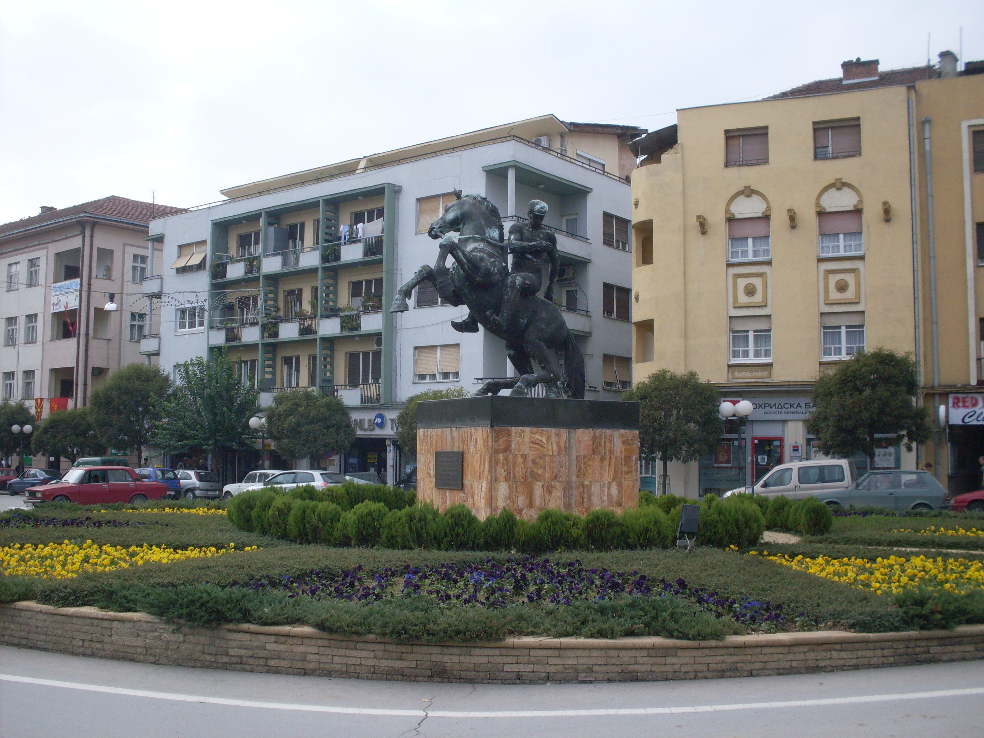 Споменик на Велешките Илинденци